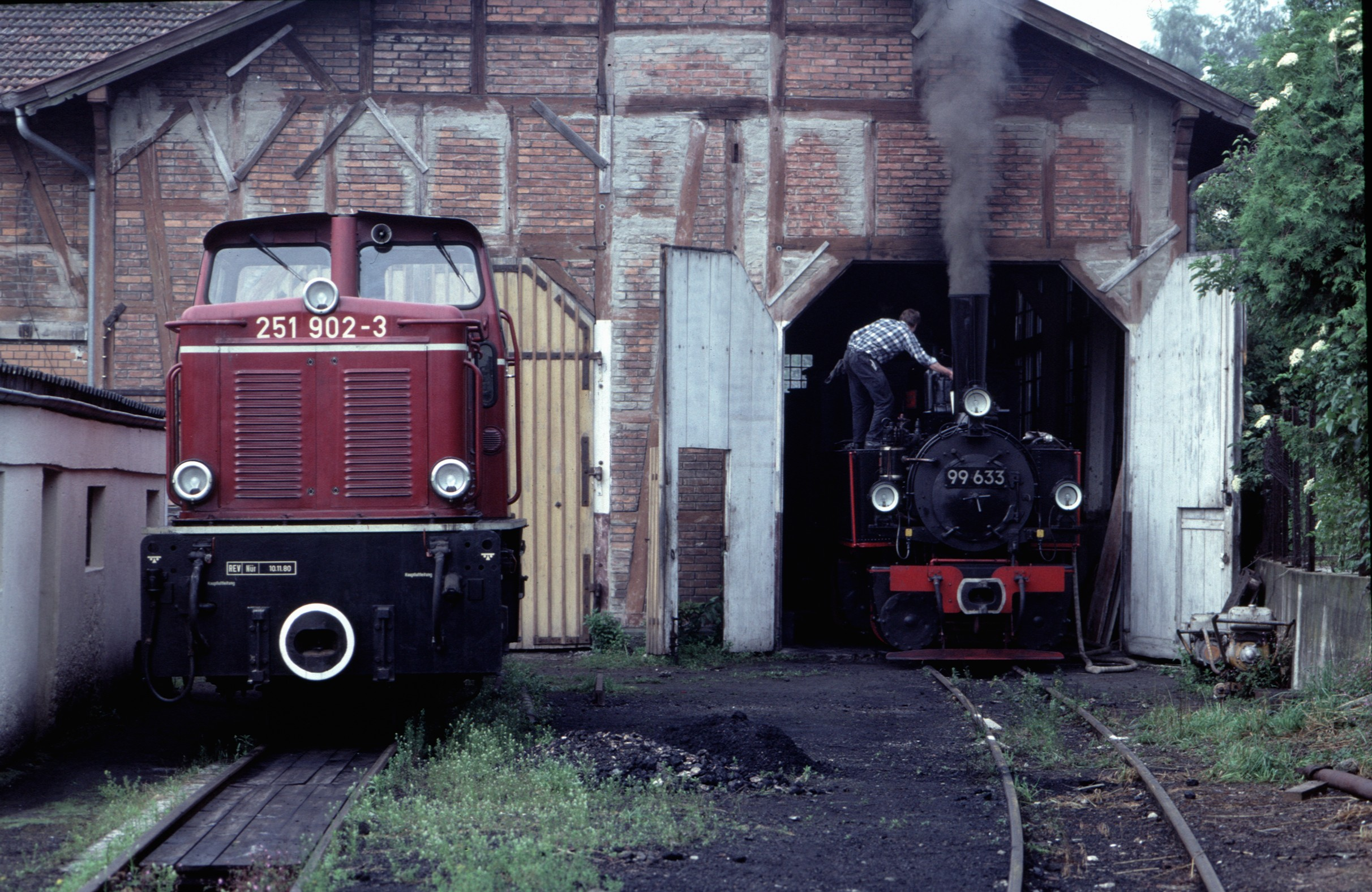 Lokschuppen Ochsenhausen am 06. Juli 1985